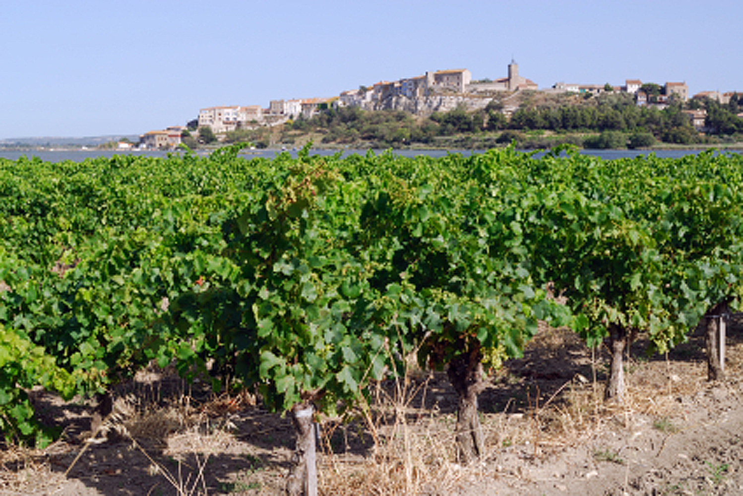 Bages et son vignoble dans l'Aude